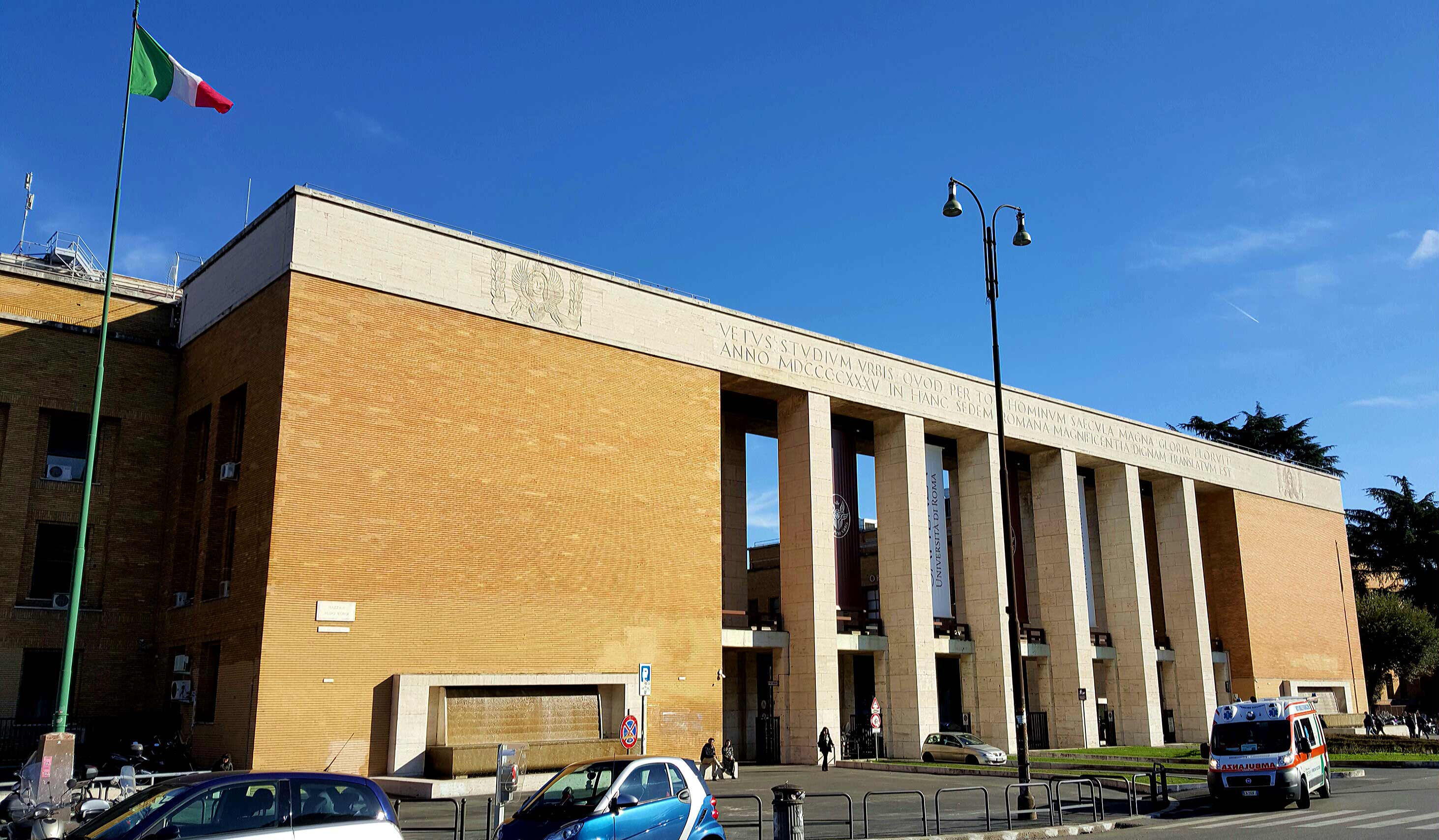 Sede della Sapienza a Roma, Piazzale Aldo Moro.